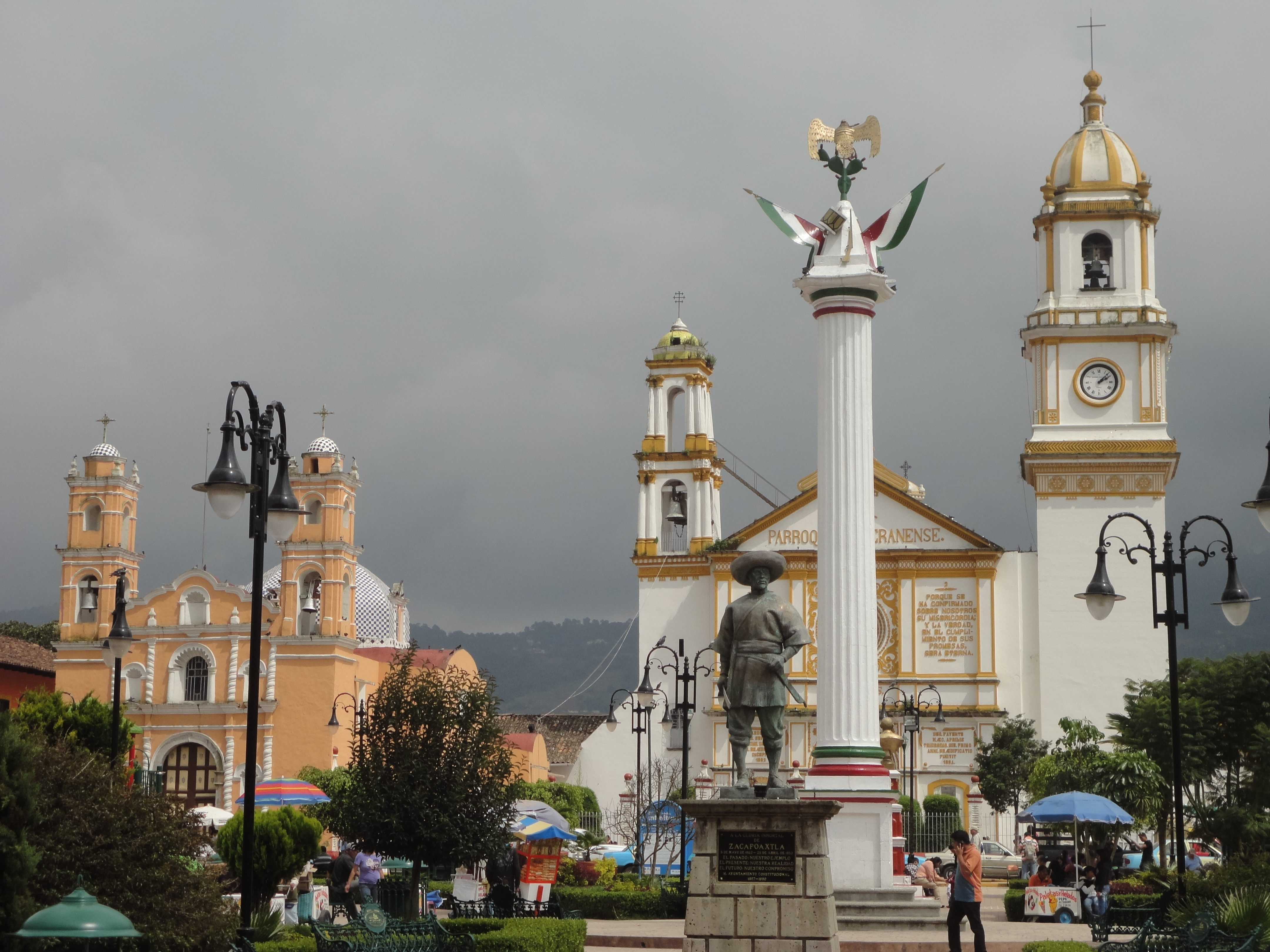 Basílica y Capilla desde la plaza principal